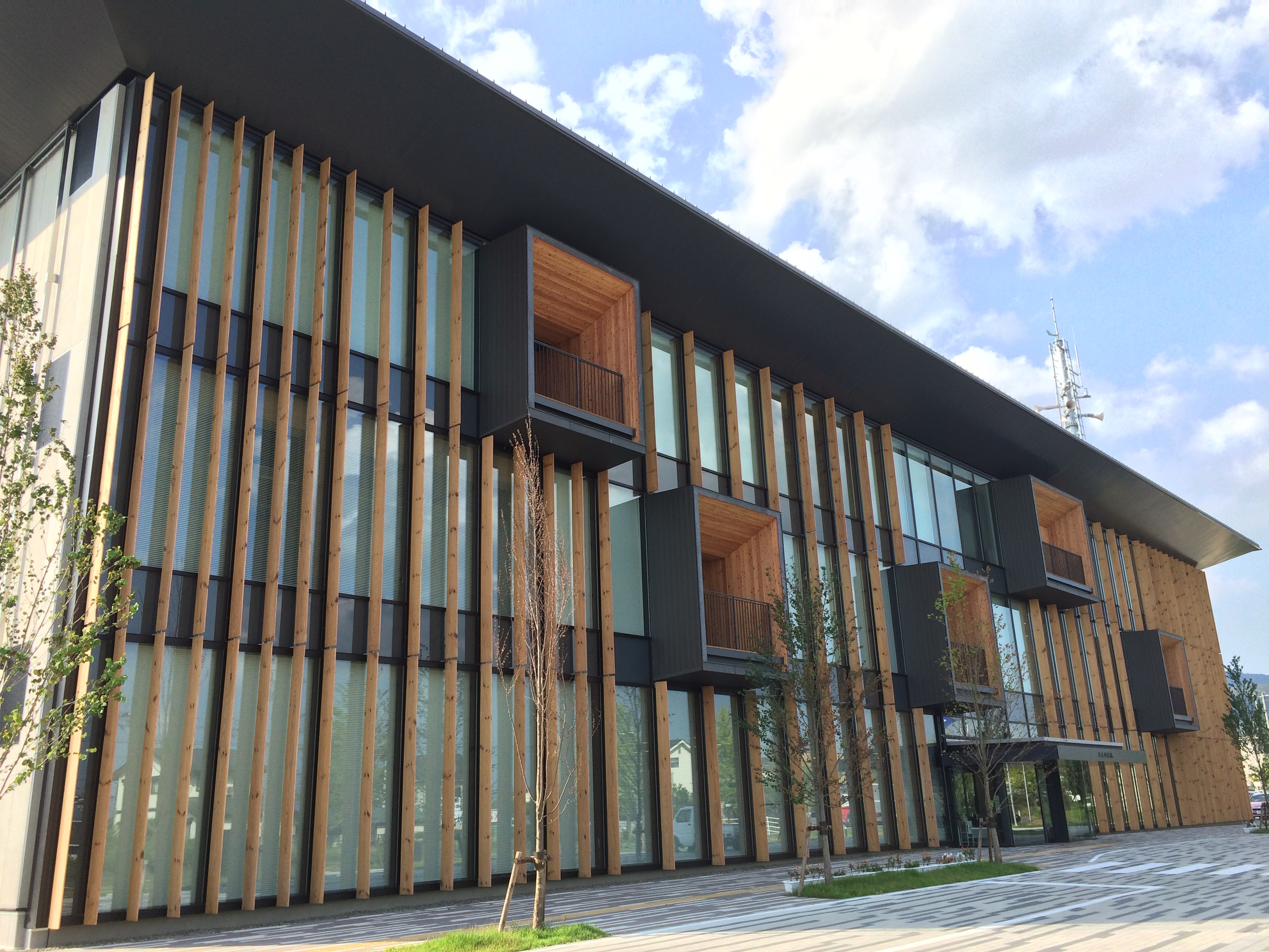 福島県伊達郡国見町役場